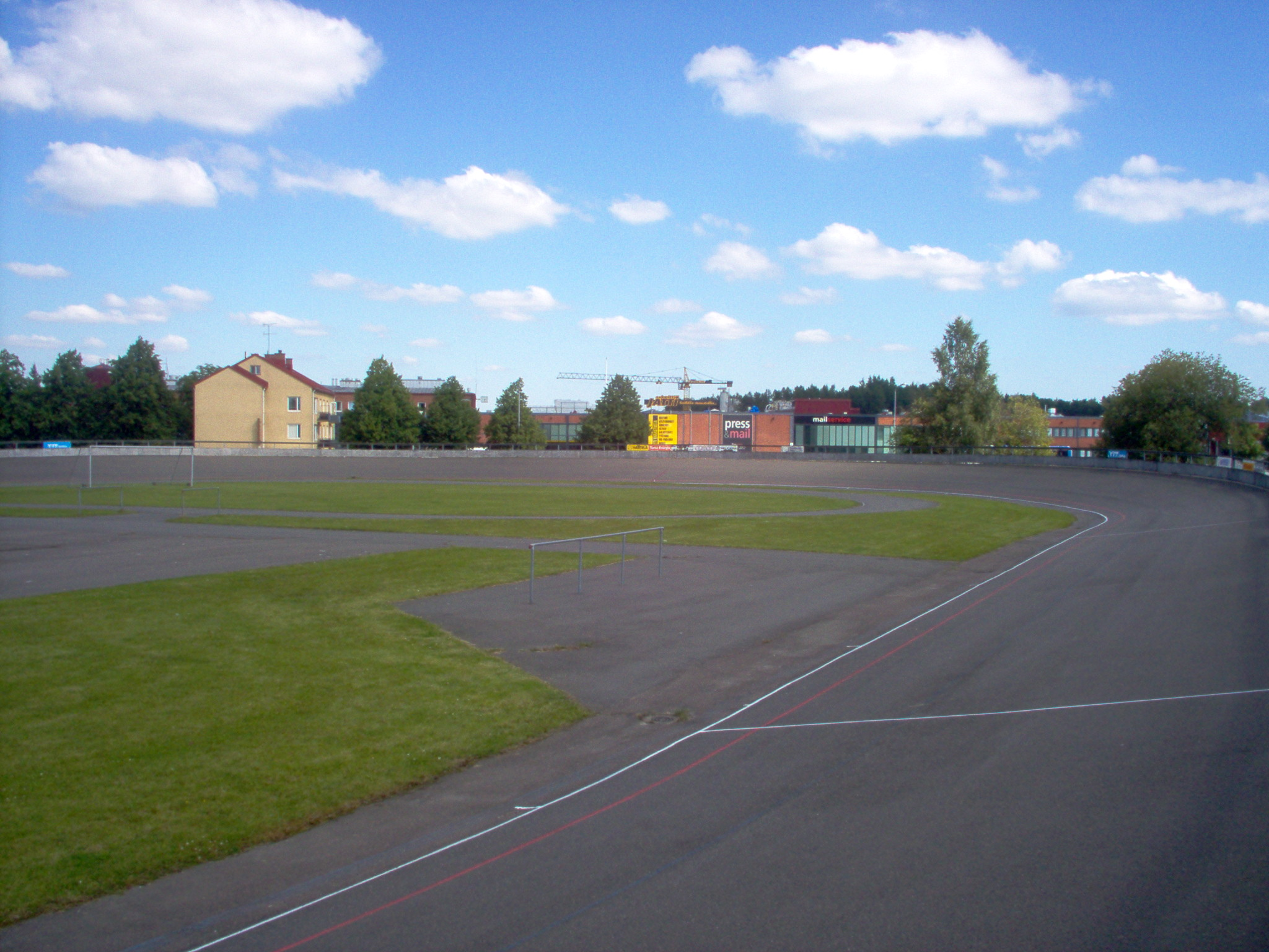 Turun velodromi